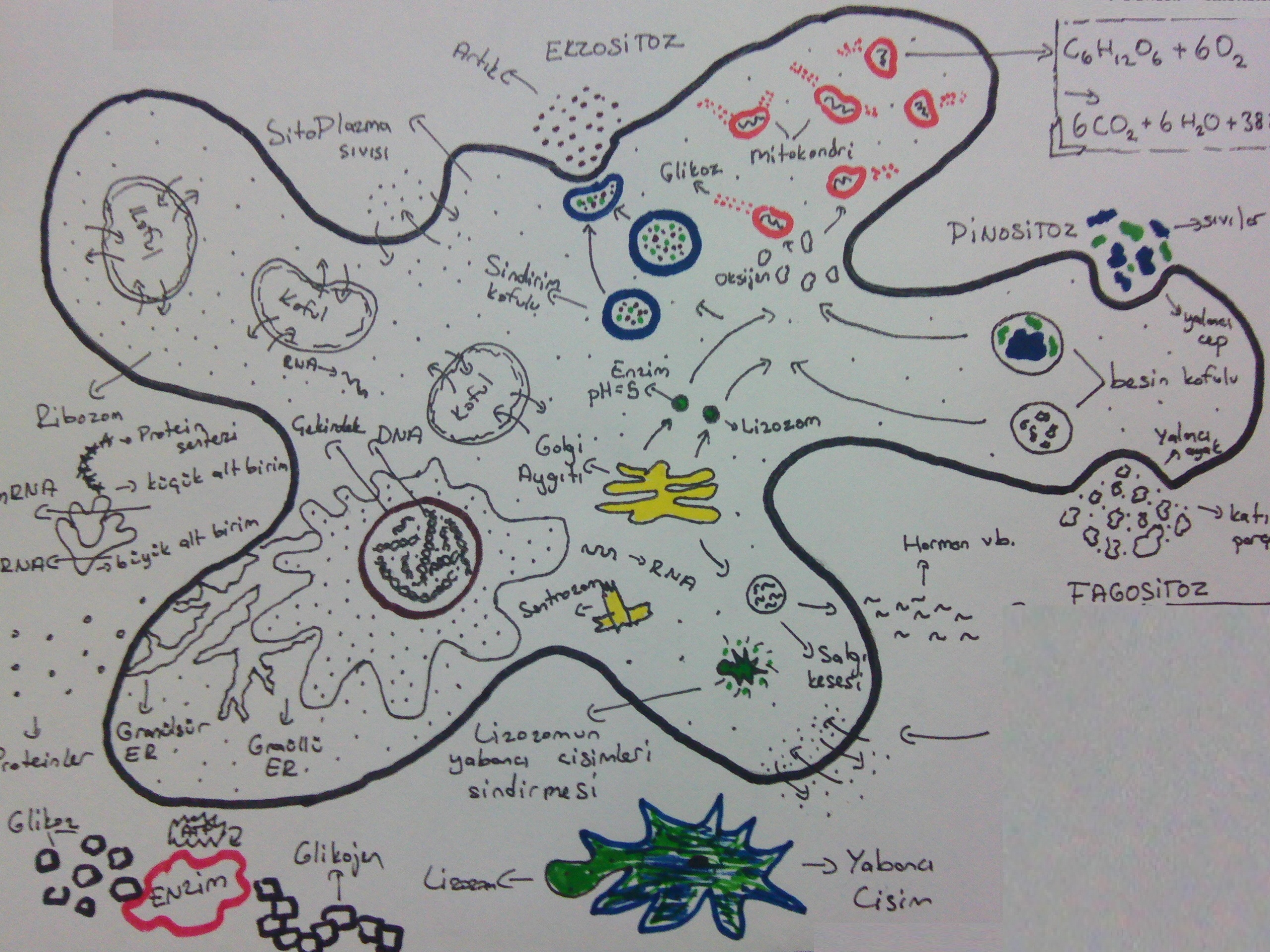 Amip canlısının yaşamsal faaliyetleri